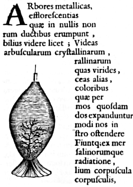 Athanasii Kircheri, Mundus subterraneus in XII Libros digestus (circa 1660)